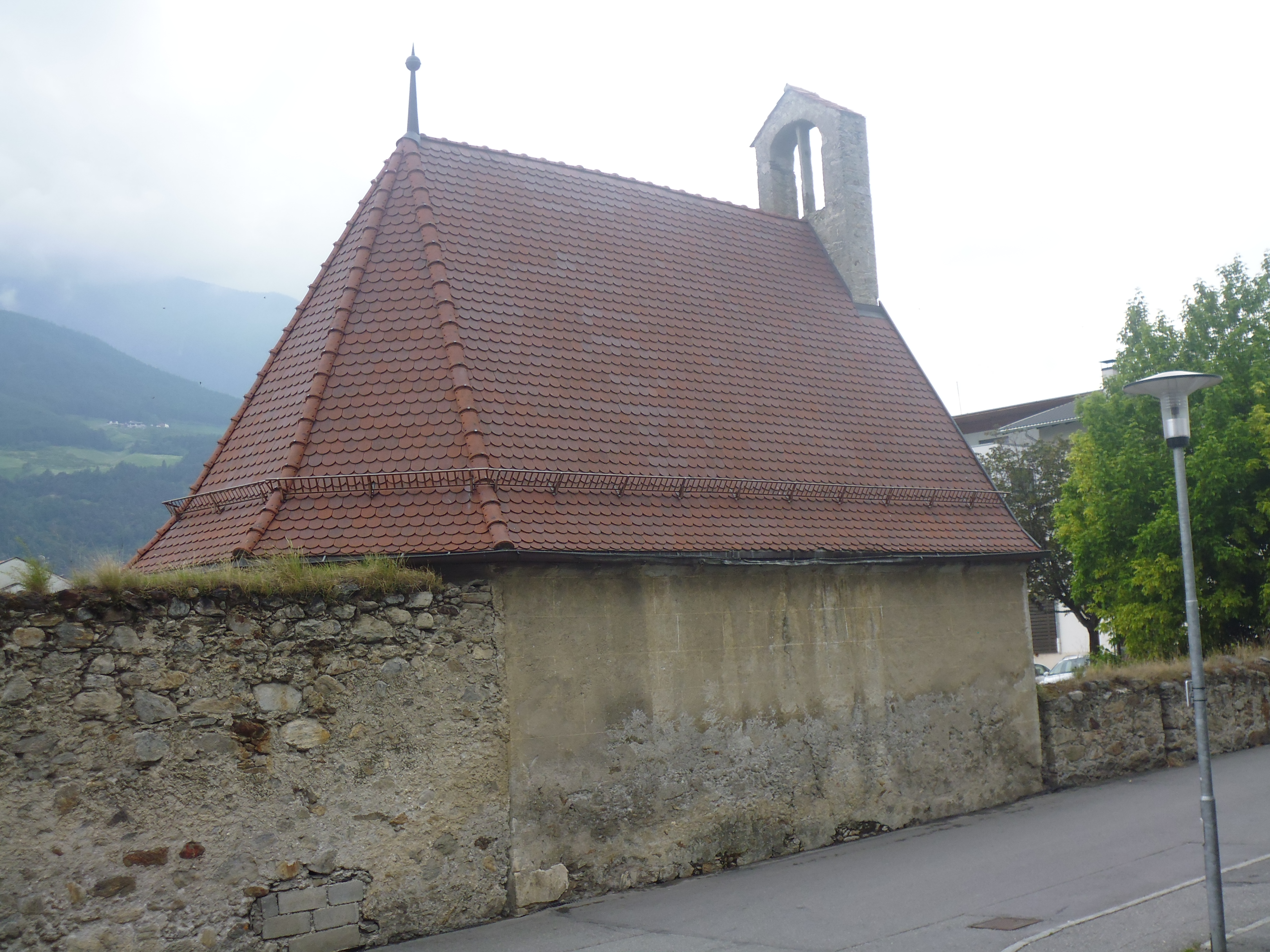 Ehemalige Kapelle St. Jenewein am Ladurnerhof in Schlanders